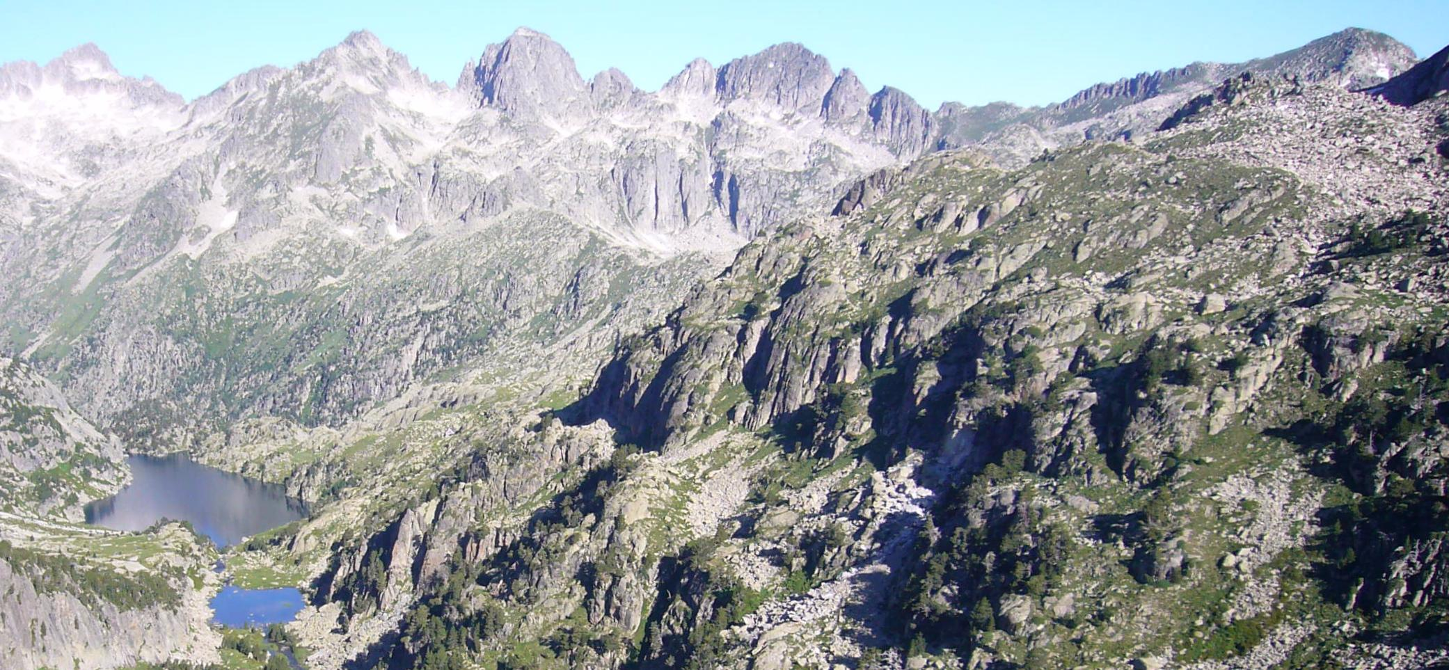 Estanys Negre i de Colieto, i Serra de Tumeneia; vistos des del Bony dels Estanyets de Colieto; la Vall de Boí, Alta Ribagorça, Catalunya